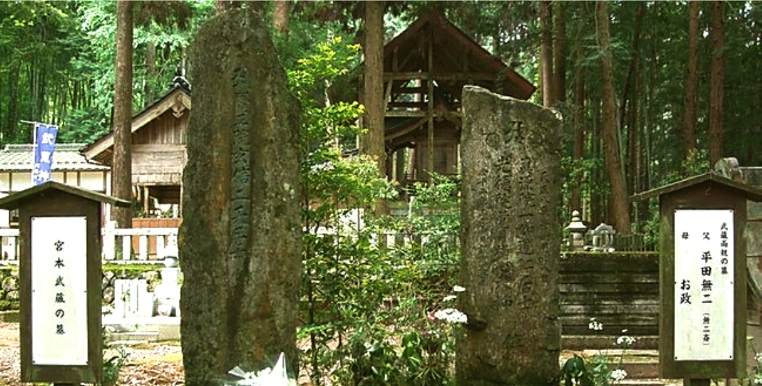 Les os de Miyamoto Musashi furent rapportés près de la tombe de ses parents située à Ōhara dans la province de Mimasaka.